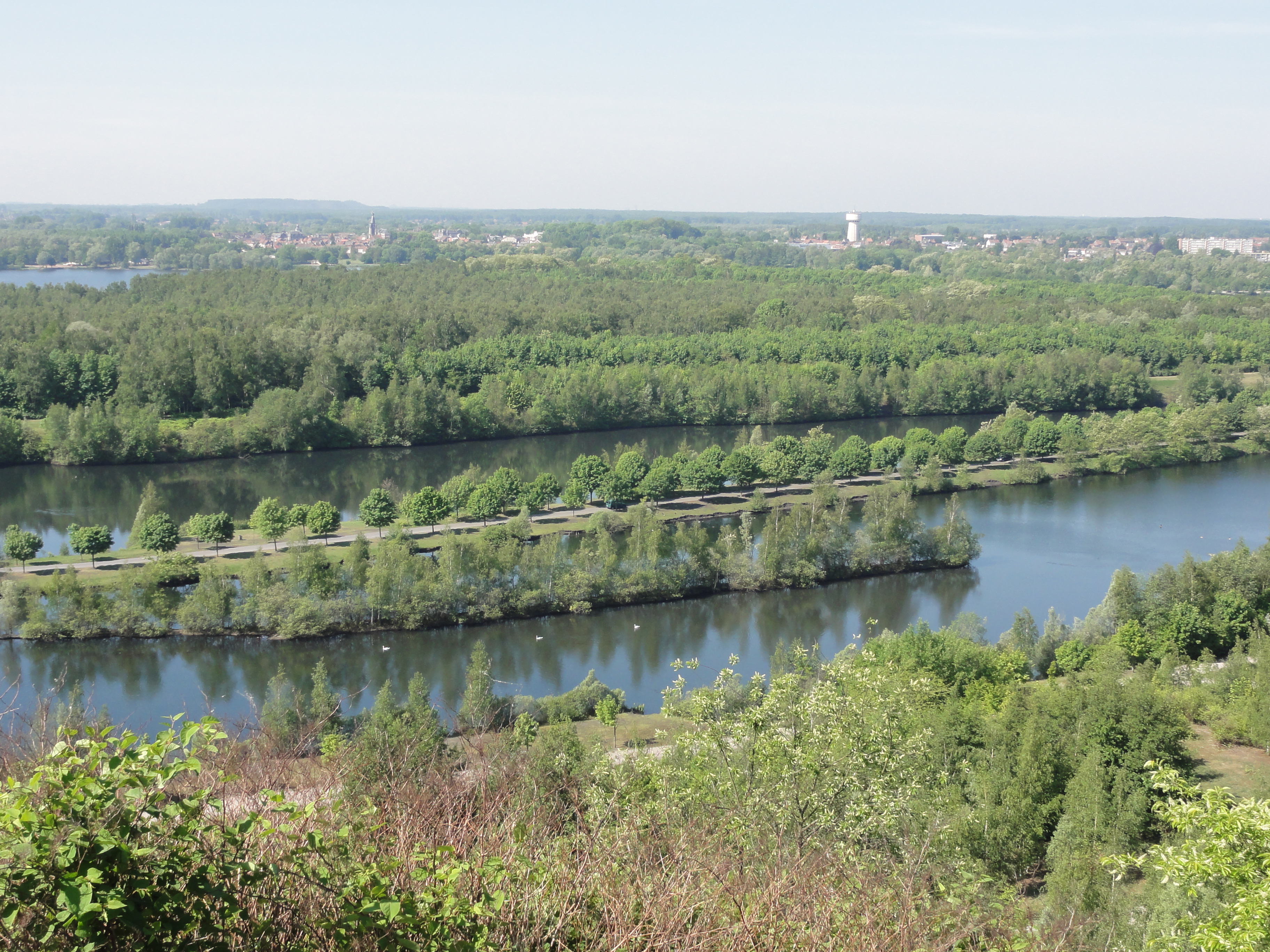 Terril n° 195 dit Ledoux Nouvelle Route, Fosse Ledoux de la Compagnie des mines d'Anzin, Condé-sur-l'Escaut, Nord, Nord-Pas-de-Calais, France.